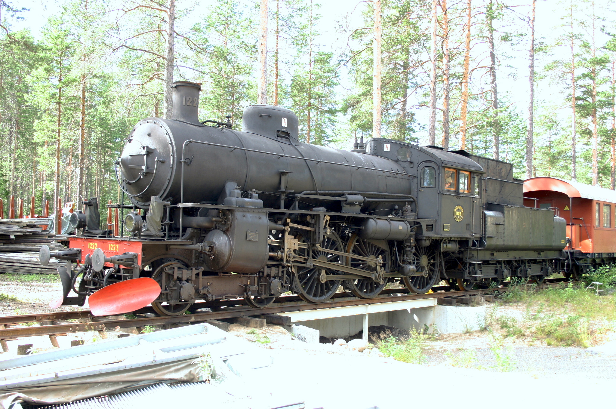 Dampflokomotive B 1222 Luleo 12.08.04